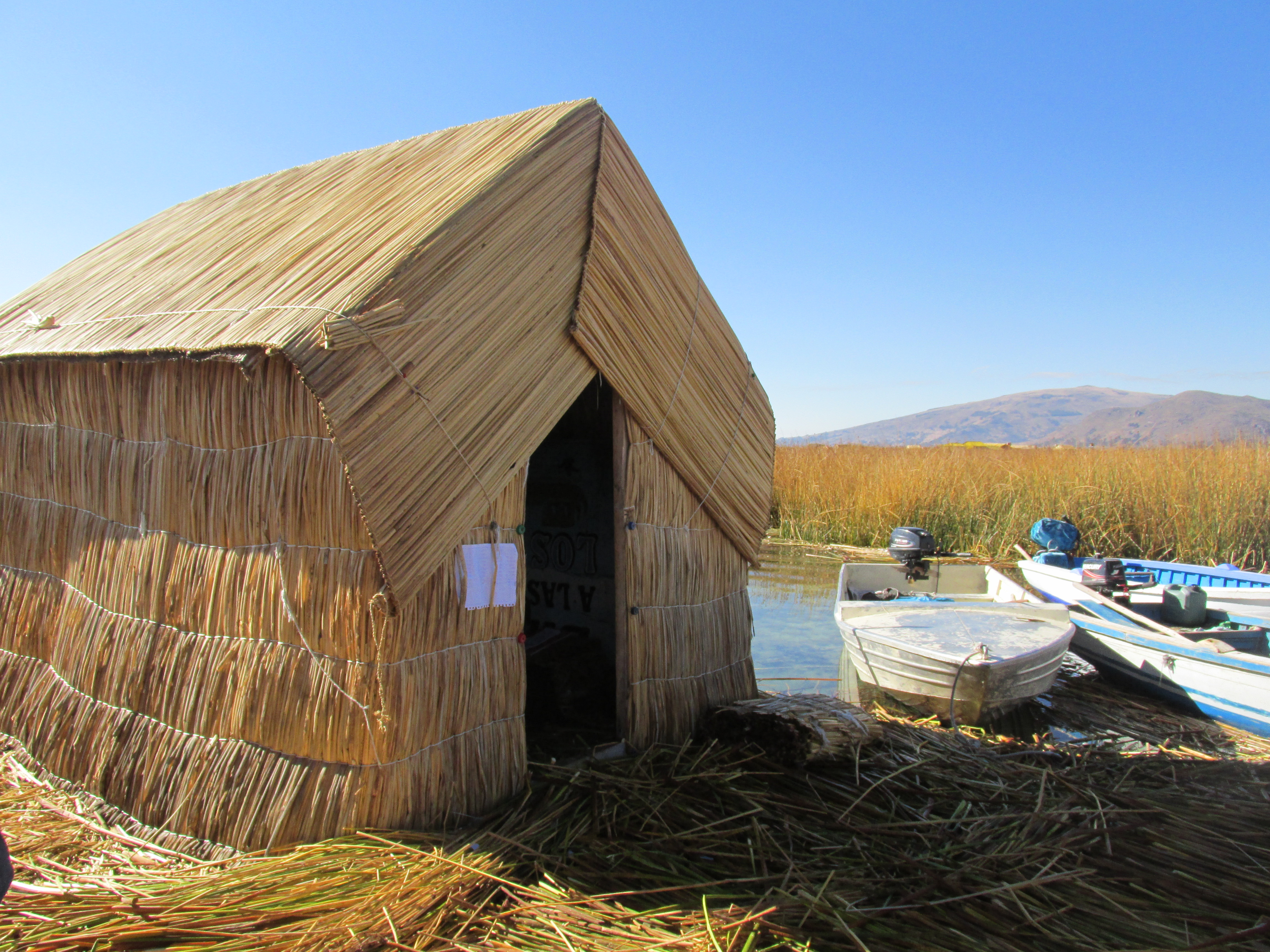 Case costruite con la totora.